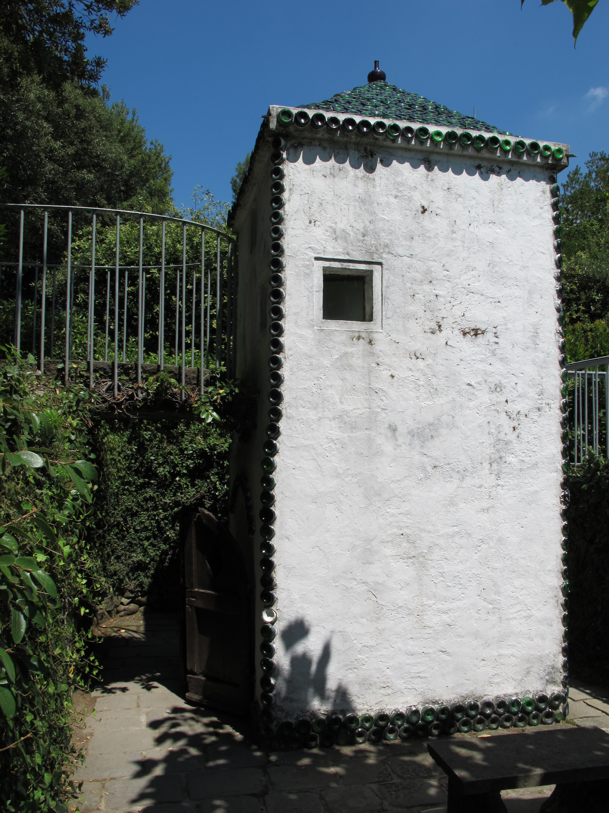 Parco di pinocchio 14 il casino della fata 01.1